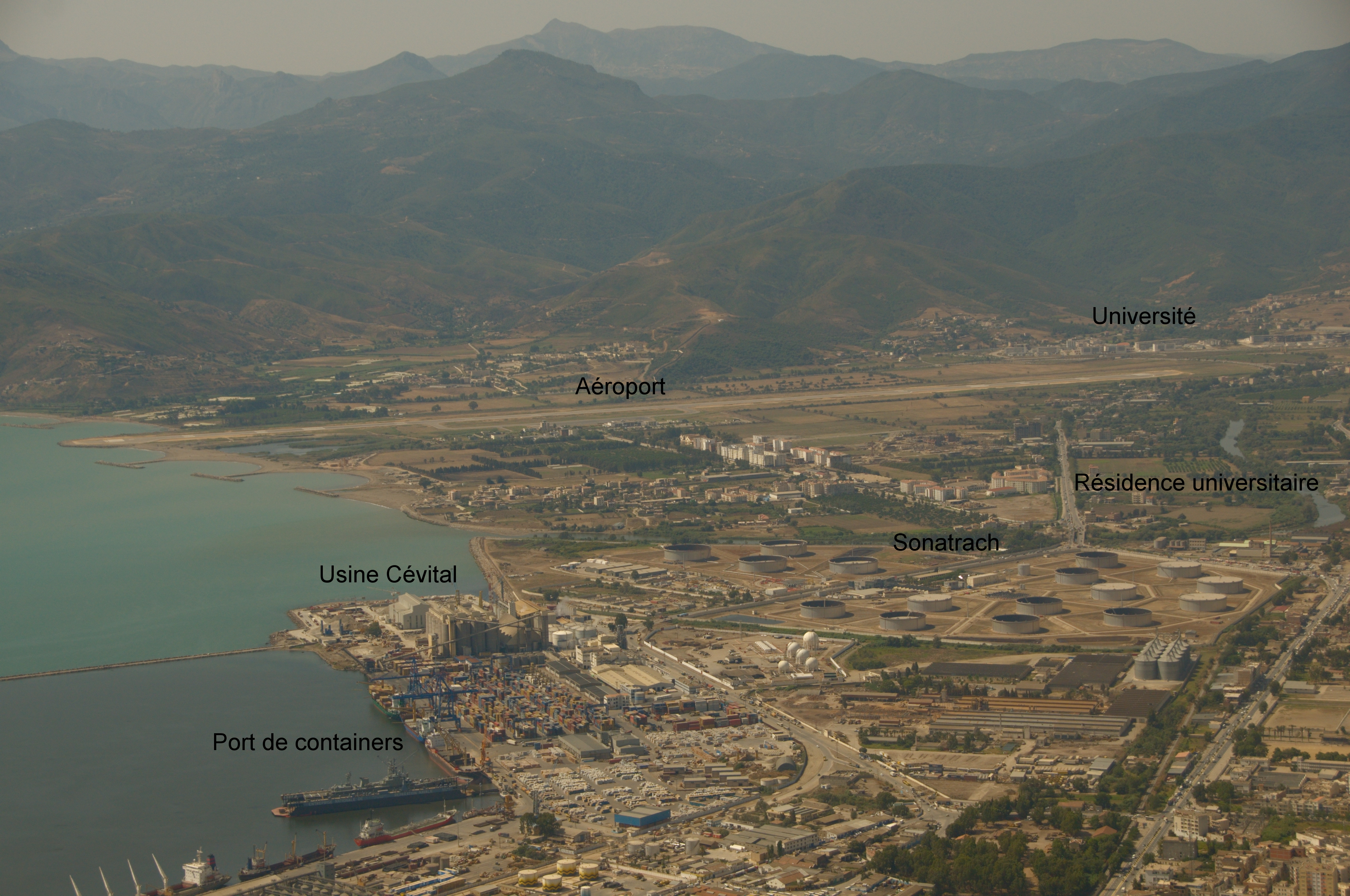 Aeroport, terminal petrolier, usine Cévital à Béjaïa